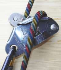 Korrekt blockierender Grigri Version 1